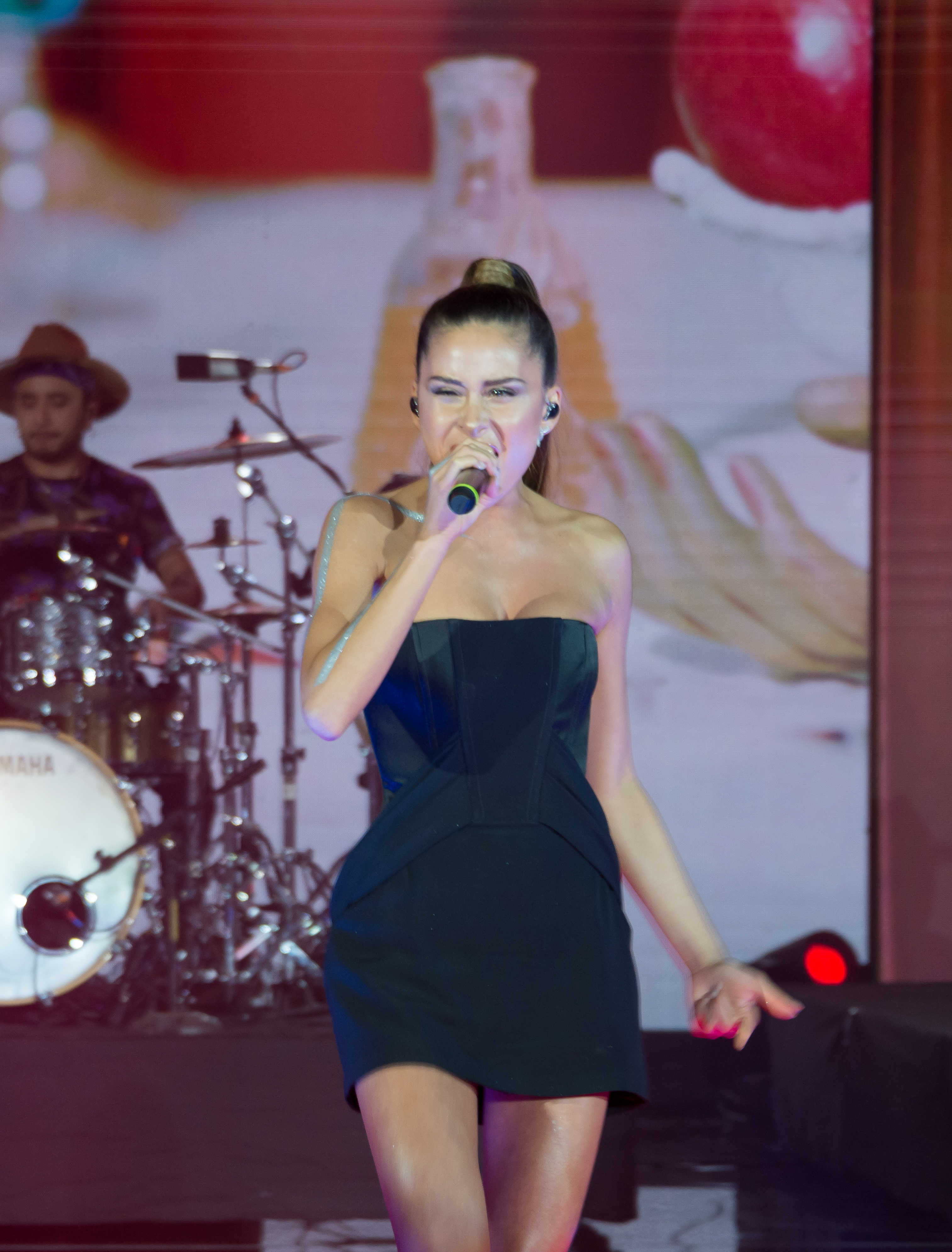 Camila Gallardo, Premios Pulsar 2019, Teatro Teletón, Santiago, Región Metropolitana, Chile.